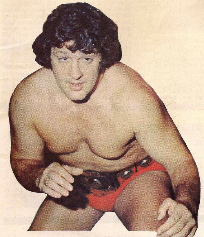 Couverture du magazine Wrestling de la NWA de 1976 avec Billy Robinson.